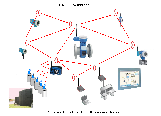 Wireless Hart Schema